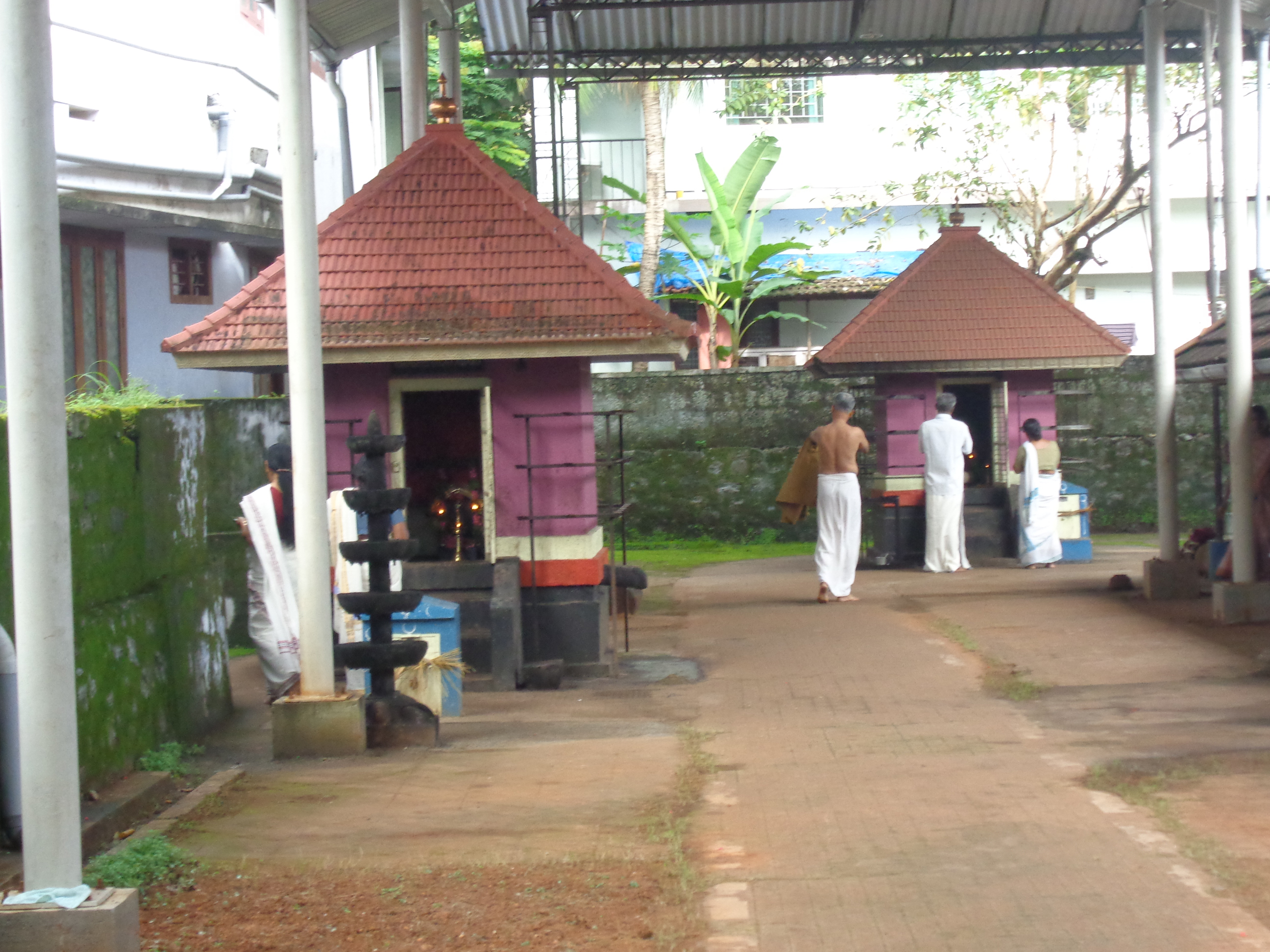 devi and ayyappa at arukizhaya